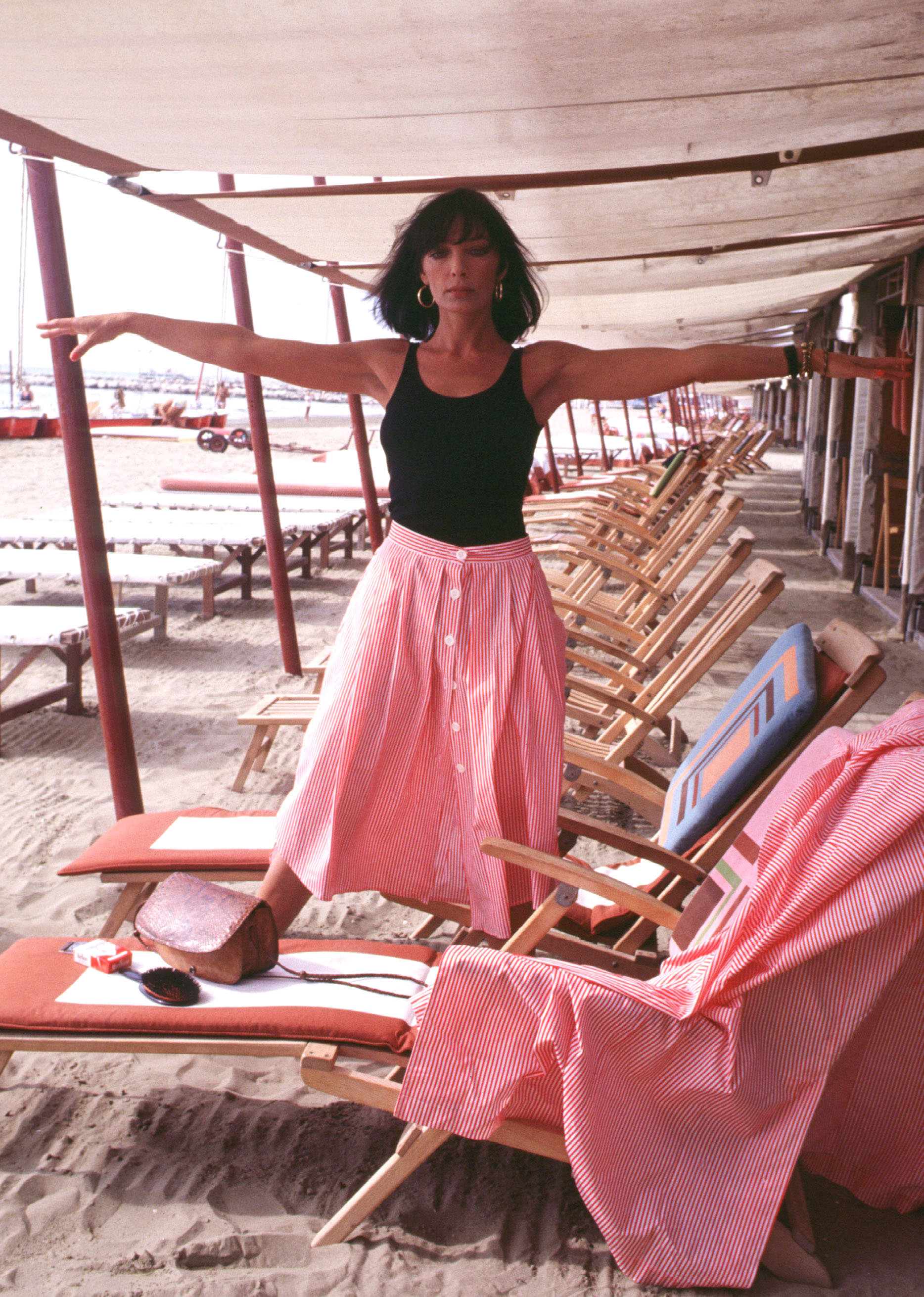 Marie Laforêt alla Mostra del cinema di Venezia del 1994